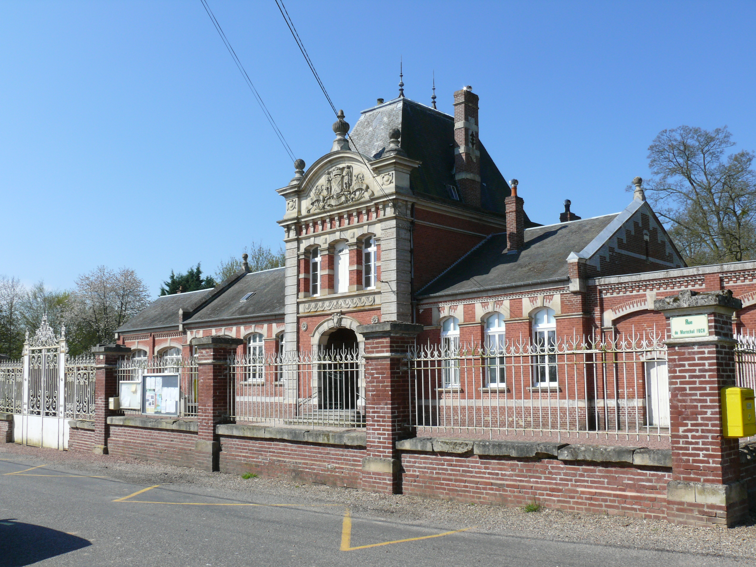 SARCUS - La mairie école financée par Rodman Wanamaker